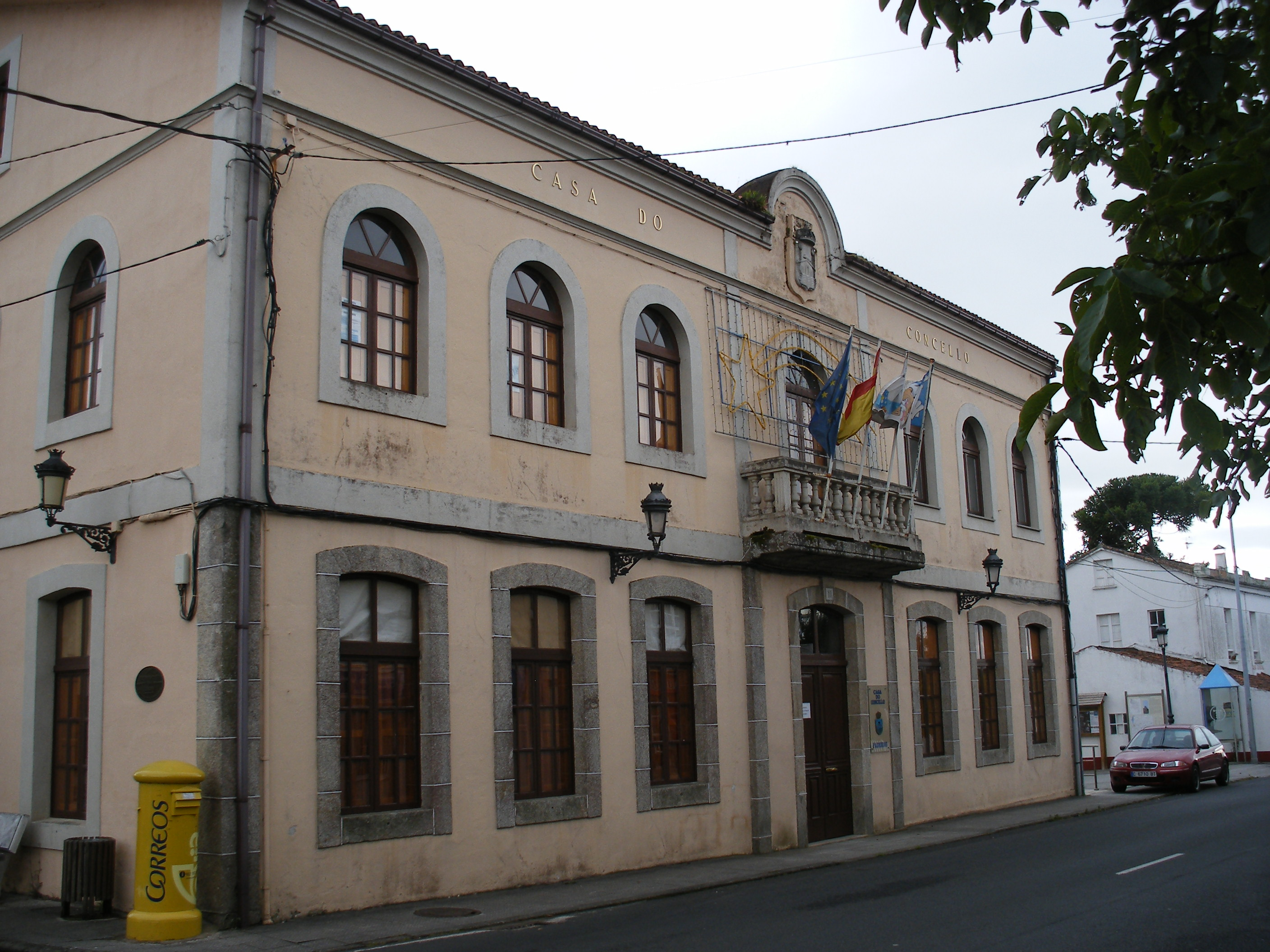 Casa do concello de Paderne